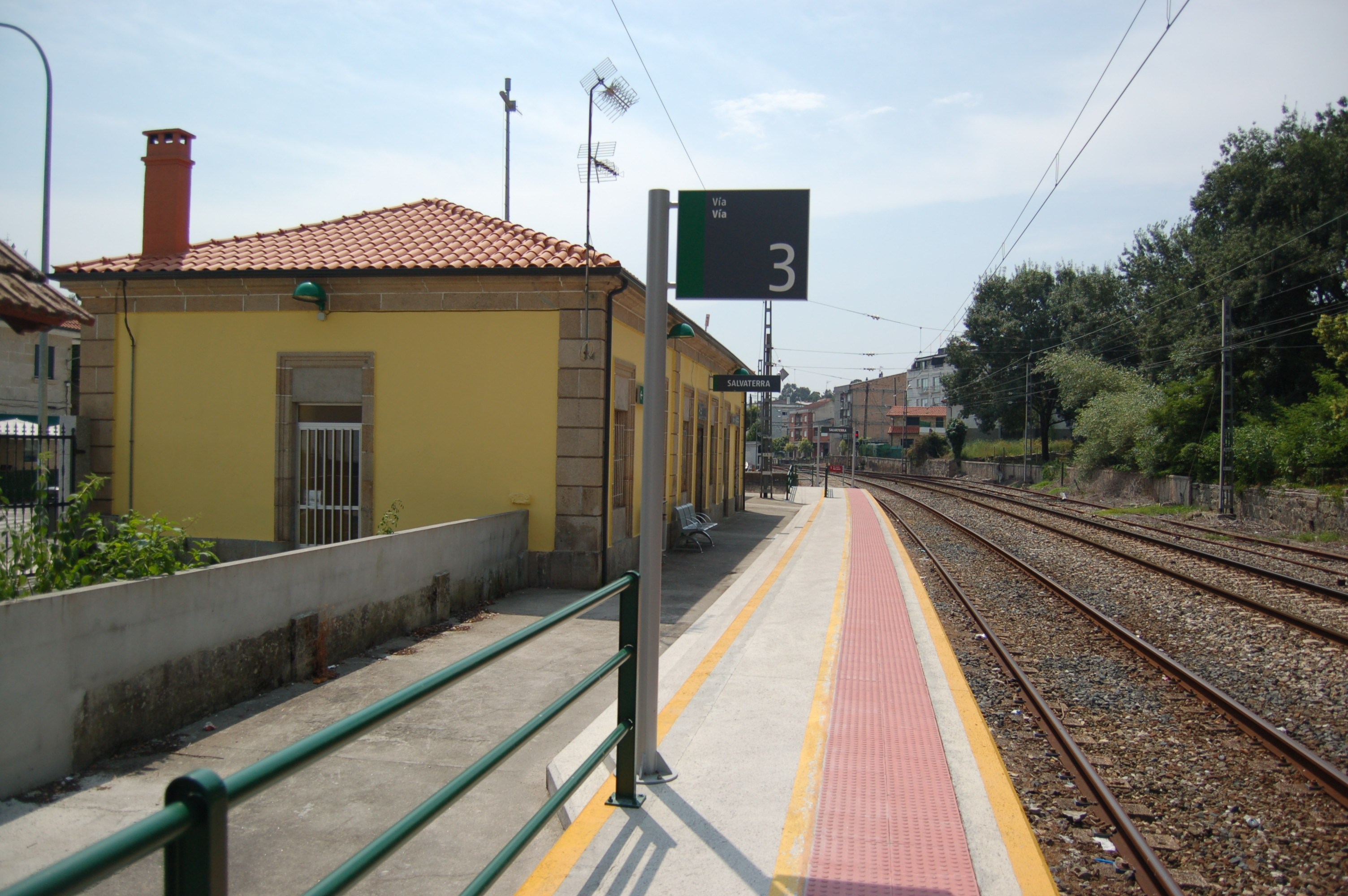 Estación de Salvatierra de Miño